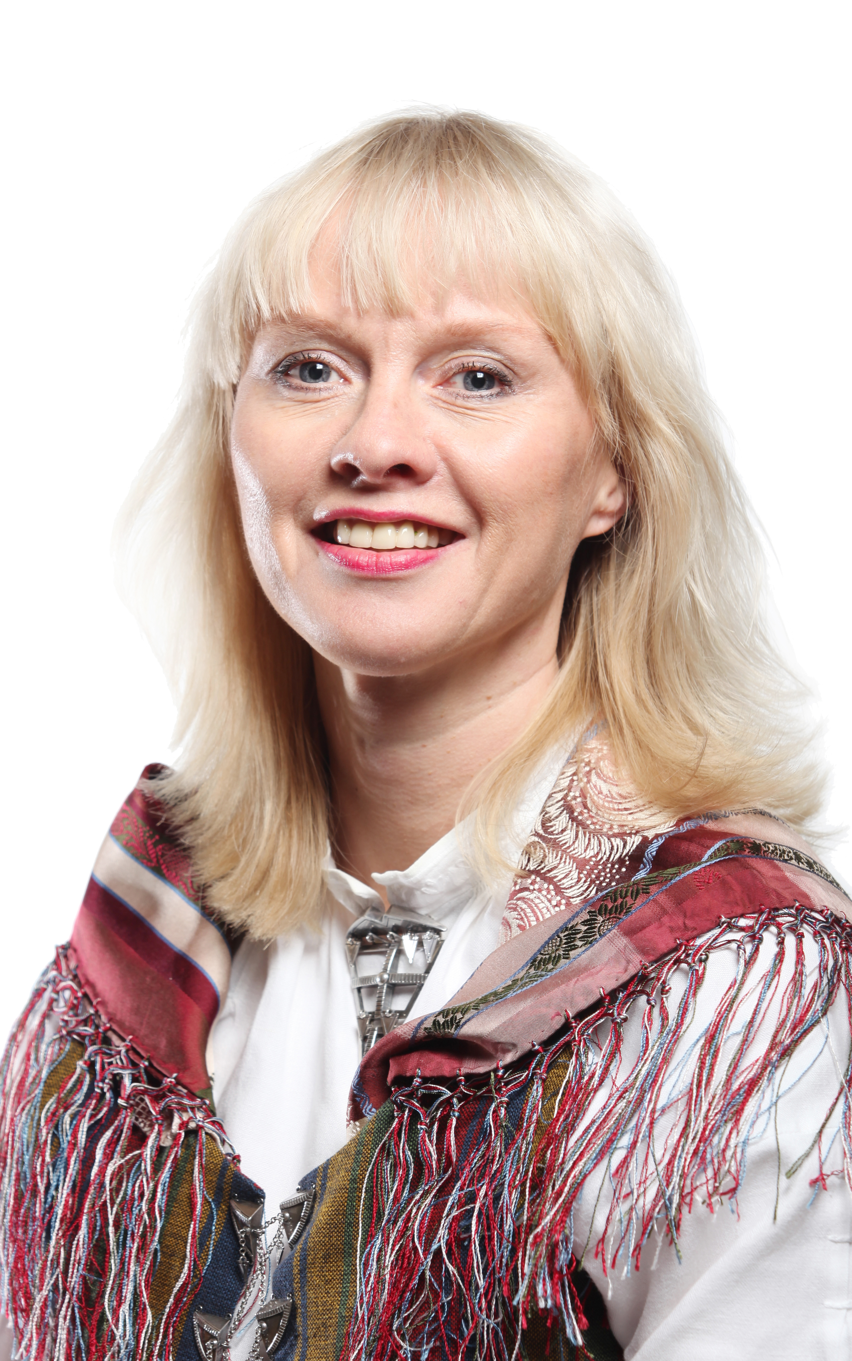 Medlem av oppvekst-, omsorg- og utdanningskomitéen. Foto: Kenneth Hætta / Sametinget.